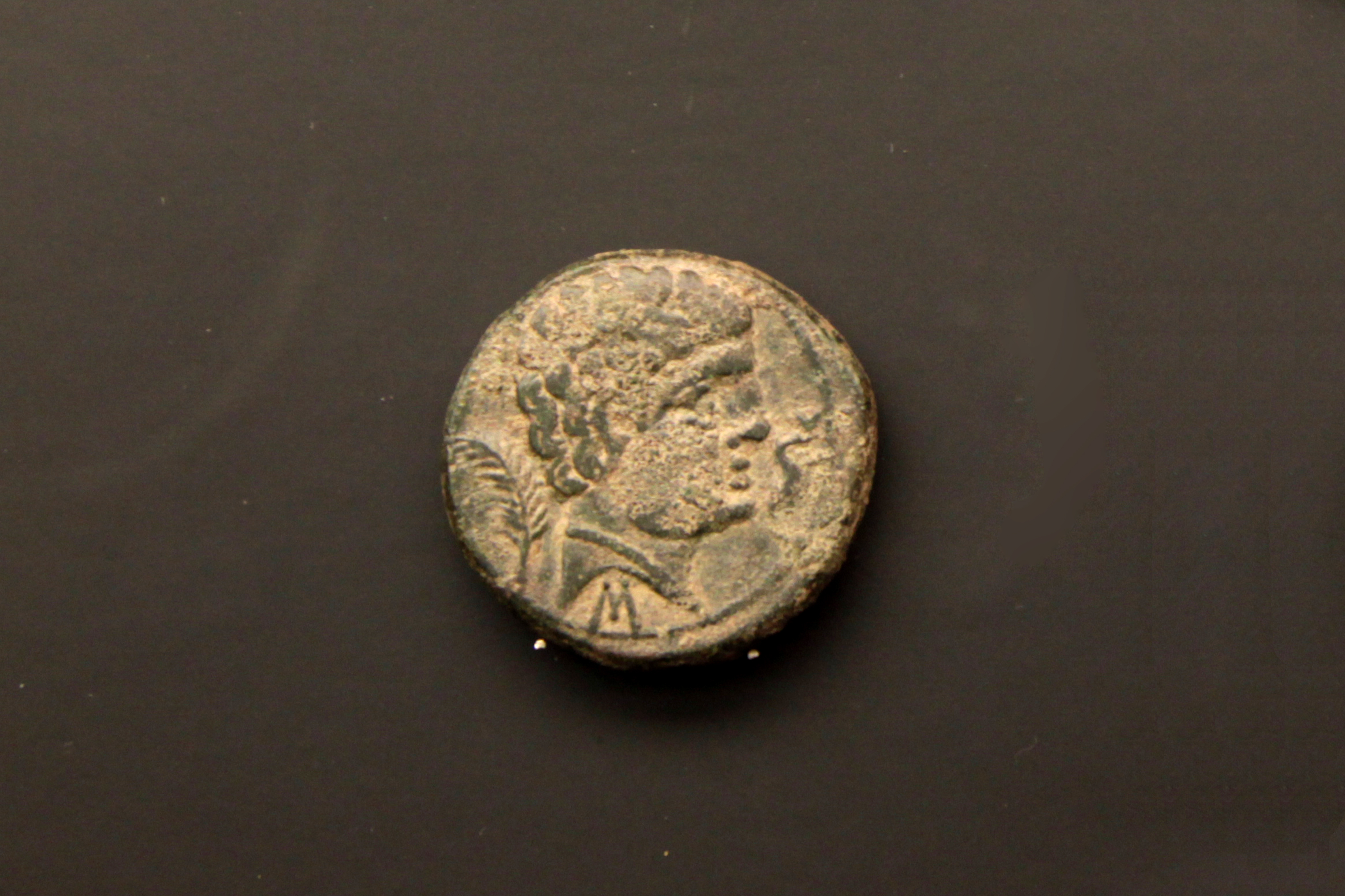 Depositada en el Museo de Prehistoria de Valencia, Comunidad valenciana, España.